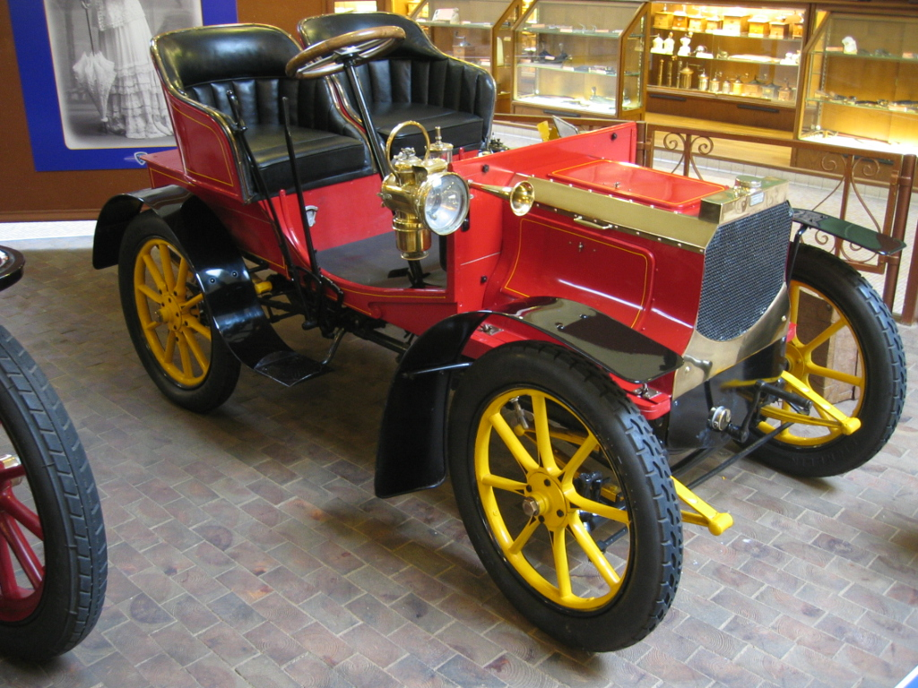 Peugeot Type 69 Bébé - Musée Peugeot Sochaux